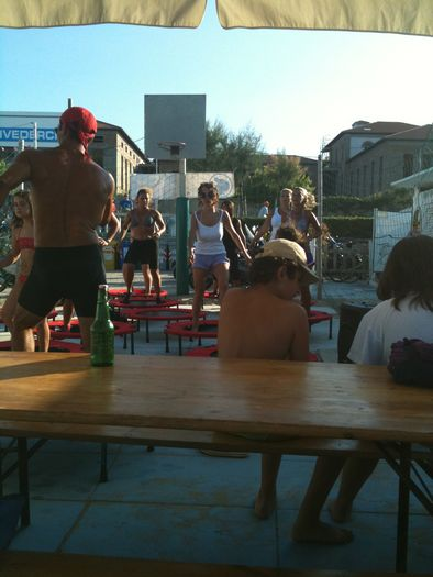 Lezione di rebound al mare